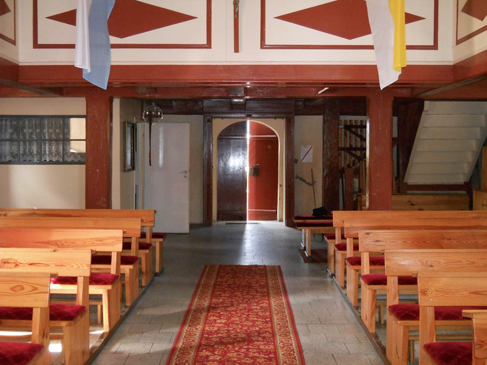 Kościół w Wojcieszycach. Widok wnętrza w stronę zachodnią.